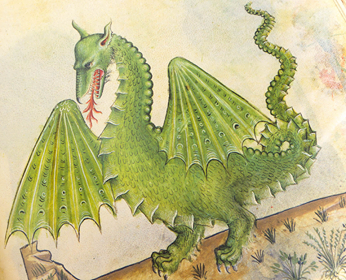 iluminura em Historia Plantarum de Giovannino Grassi.